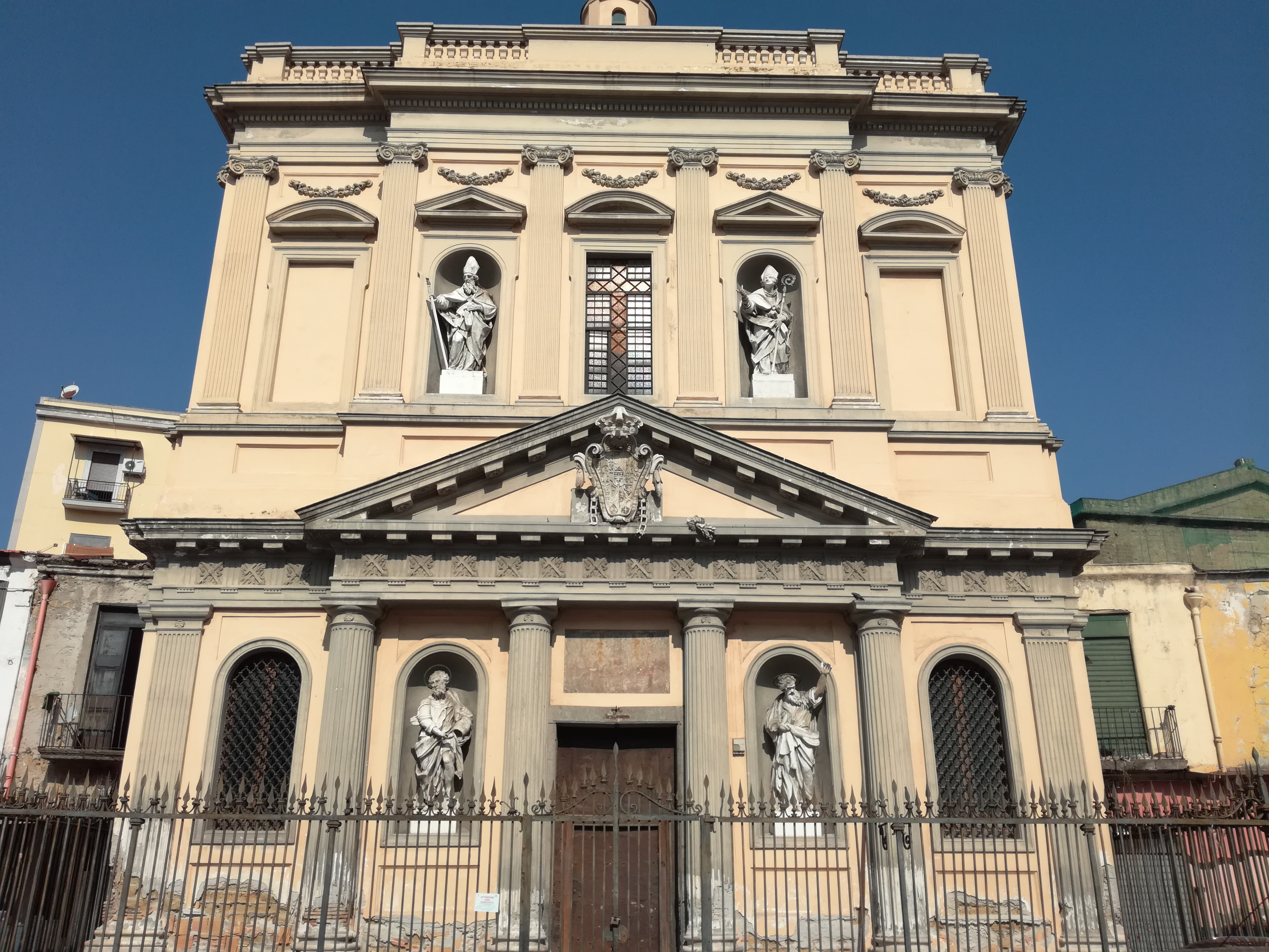 Esterno Croce al Purgatorio